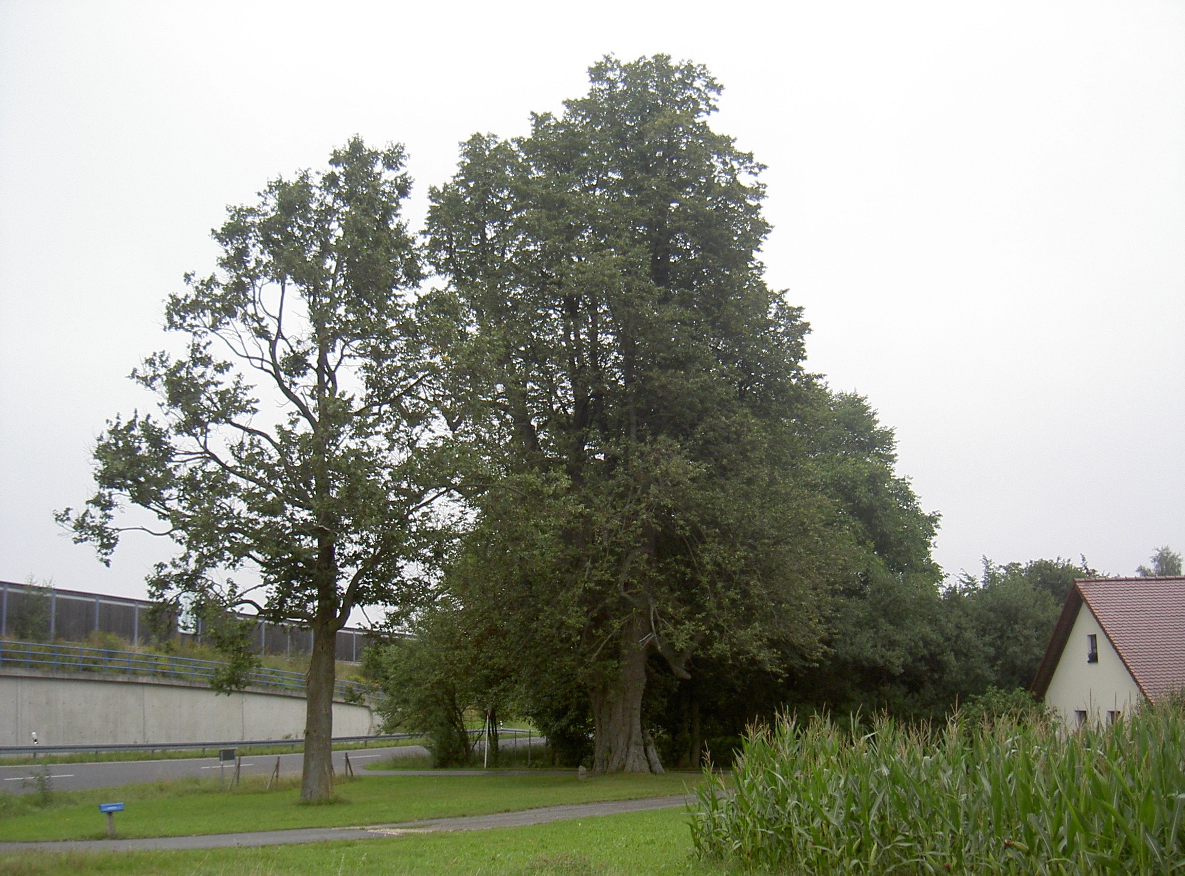 Kaltenbaum